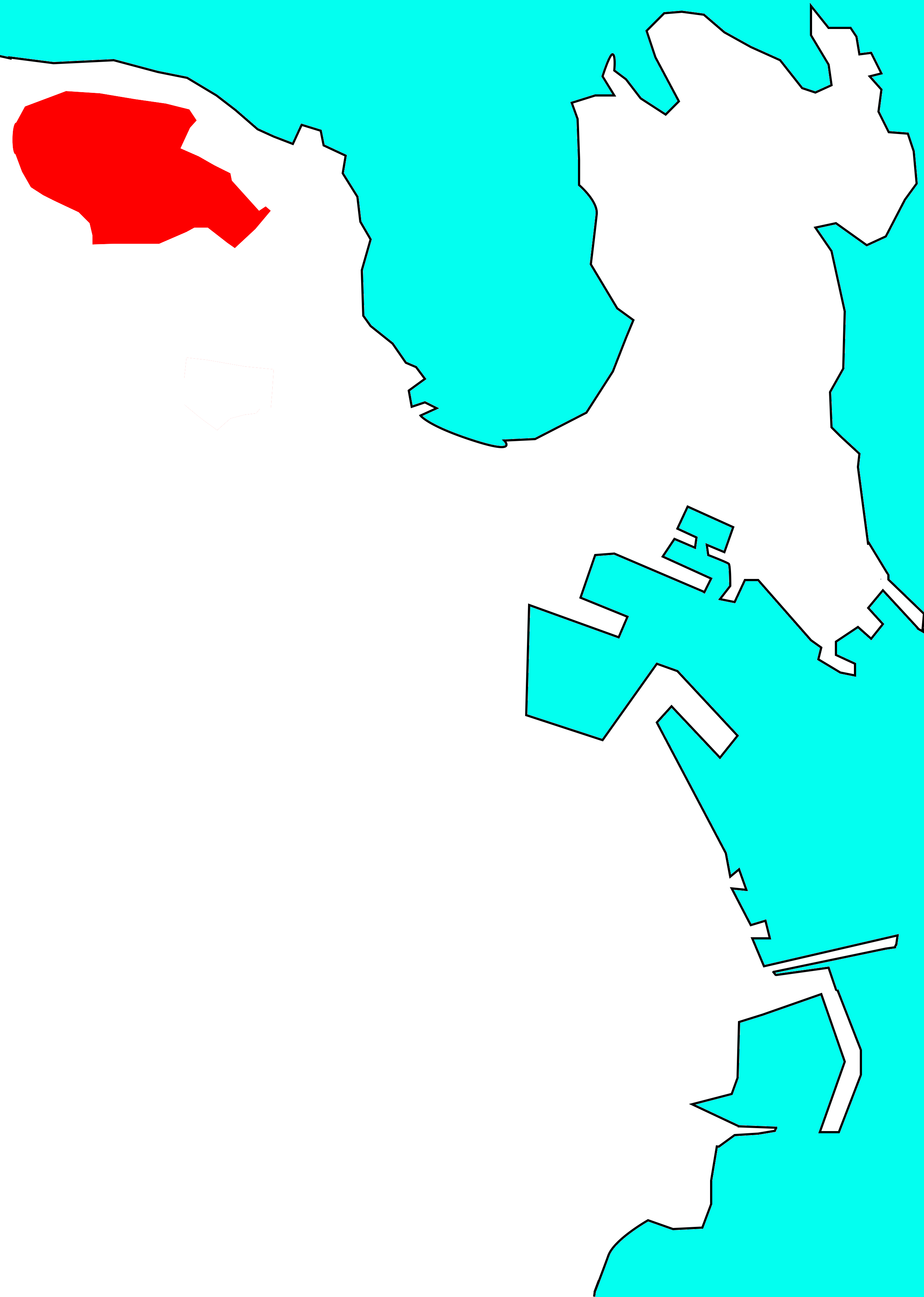 Situación dos Rosales no concello da Coruña.[1]